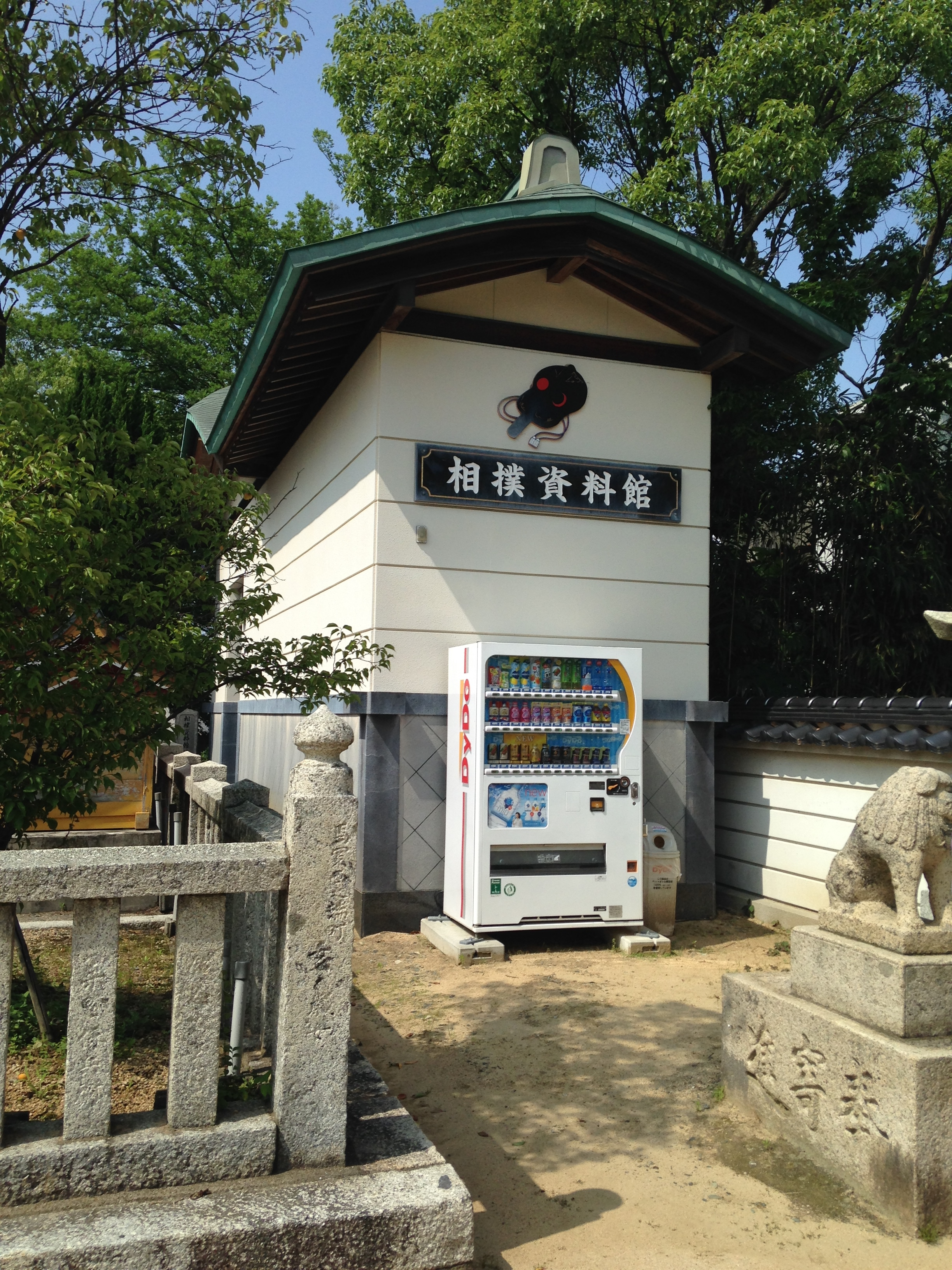 忌宮神社境内・相撲資料館